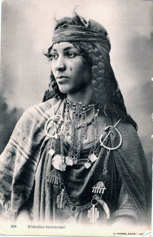 Bédouine tunisienne en 1907.